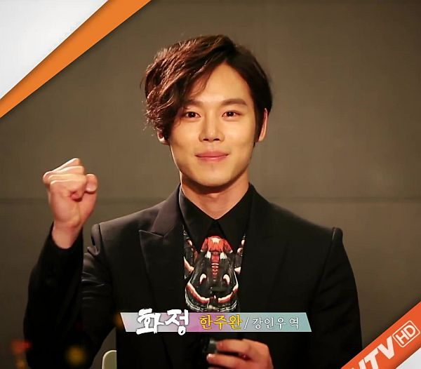 2015.07.05韓周完拍攝CNTV《華政》番宣短片